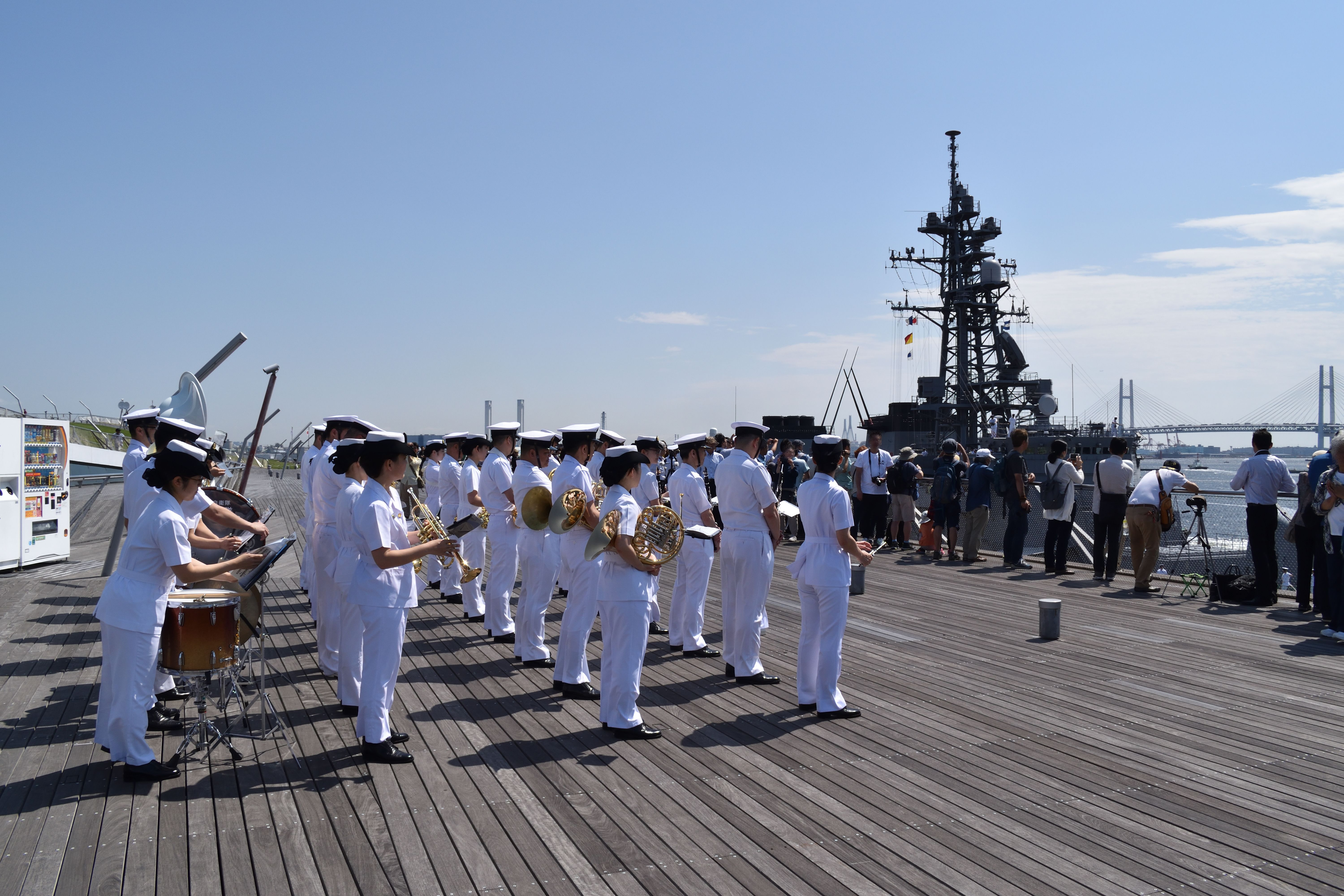 横浜港大さん橋ふ頭上で護衛艦「たかなみ」の入港演奏を行う海上自衛隊東京音楽隊。